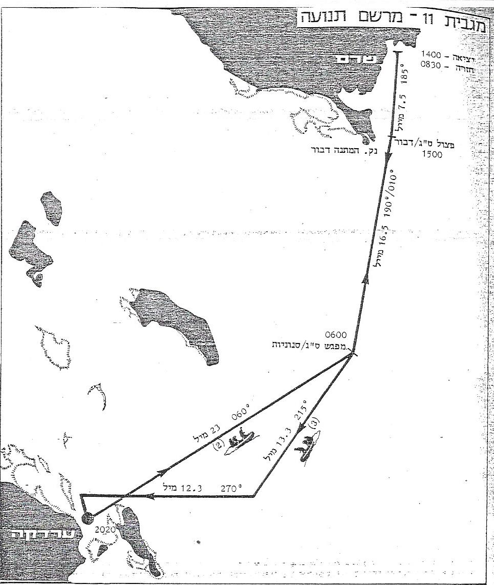 מסלול התנועה של סירות הגומי ליעד וחזרה בפעולת מגבית11